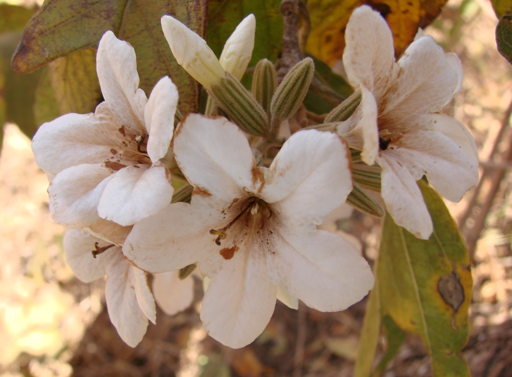 Cordia glabrata - BORAGINACEAE Reserva Extrativista de Recanto das Araras de Terra Ronca - São Domingos - Goiás - Brasil.